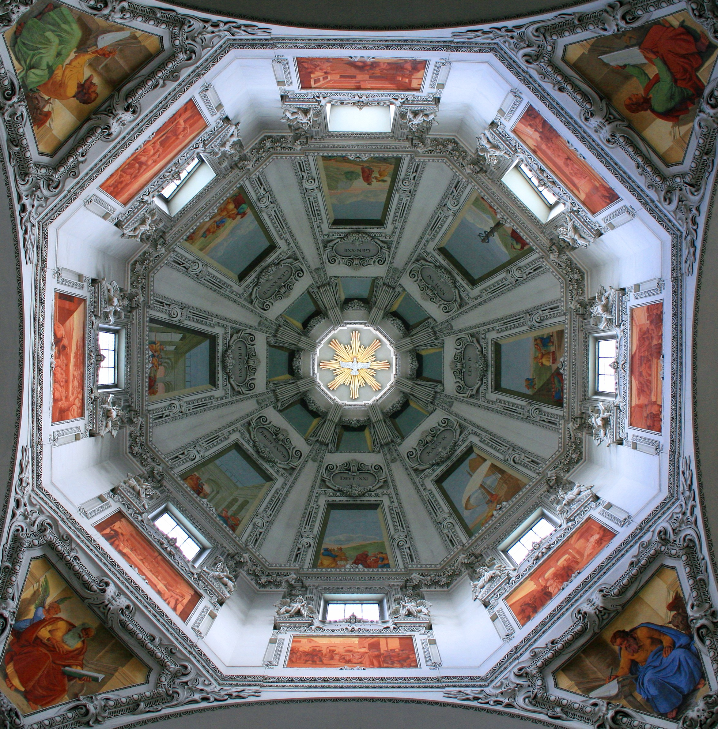 Salzburger Dom